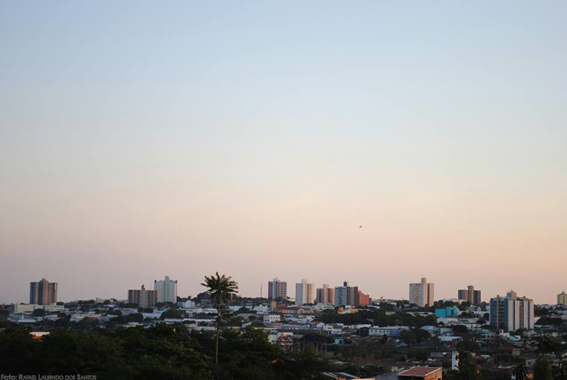 Foto panorâmica do centro de Sumaré.